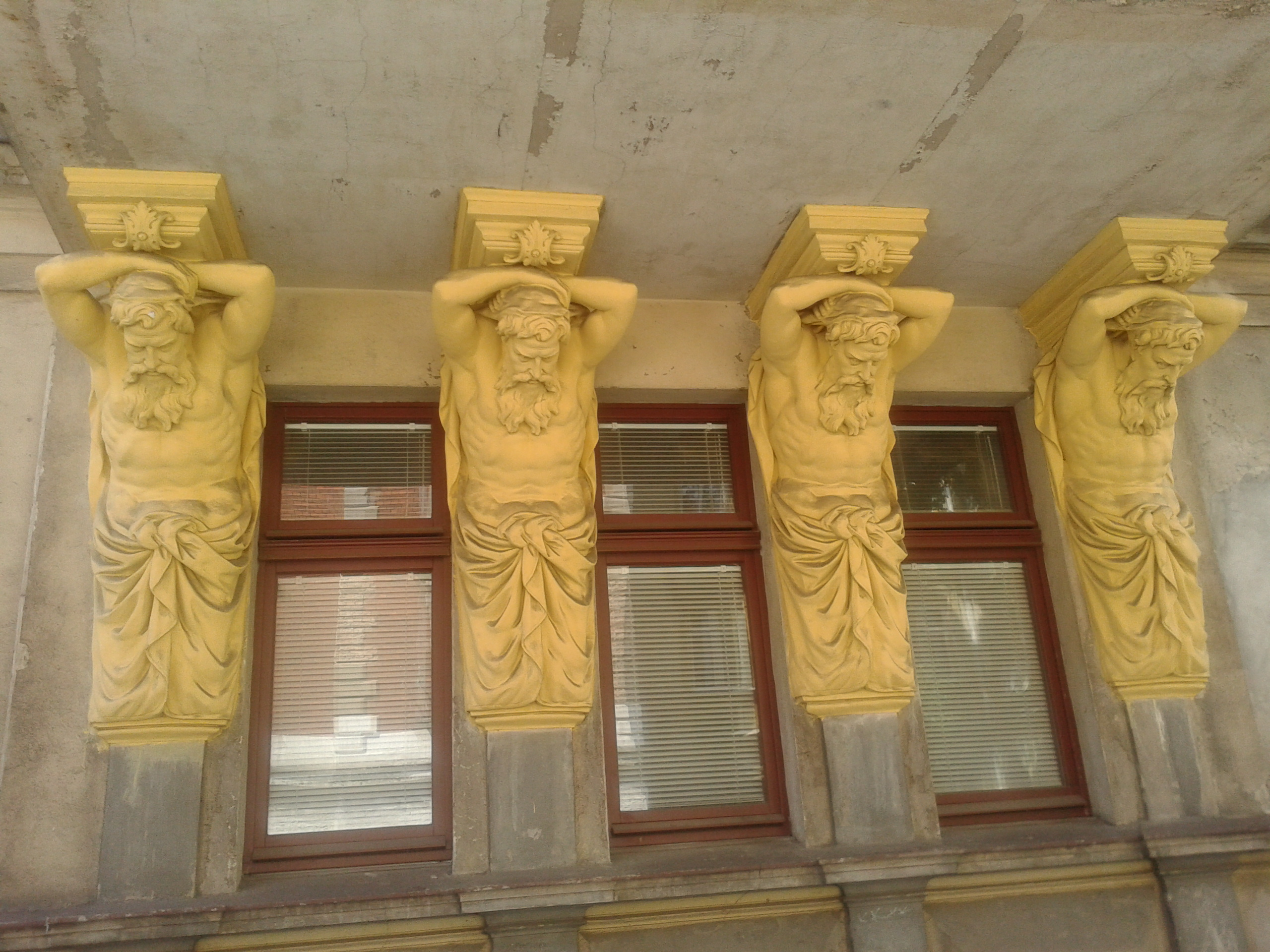 atlanci wspierający wykusz kamienicy pod adresem Sienkiewicza 19/21 w Toruniu